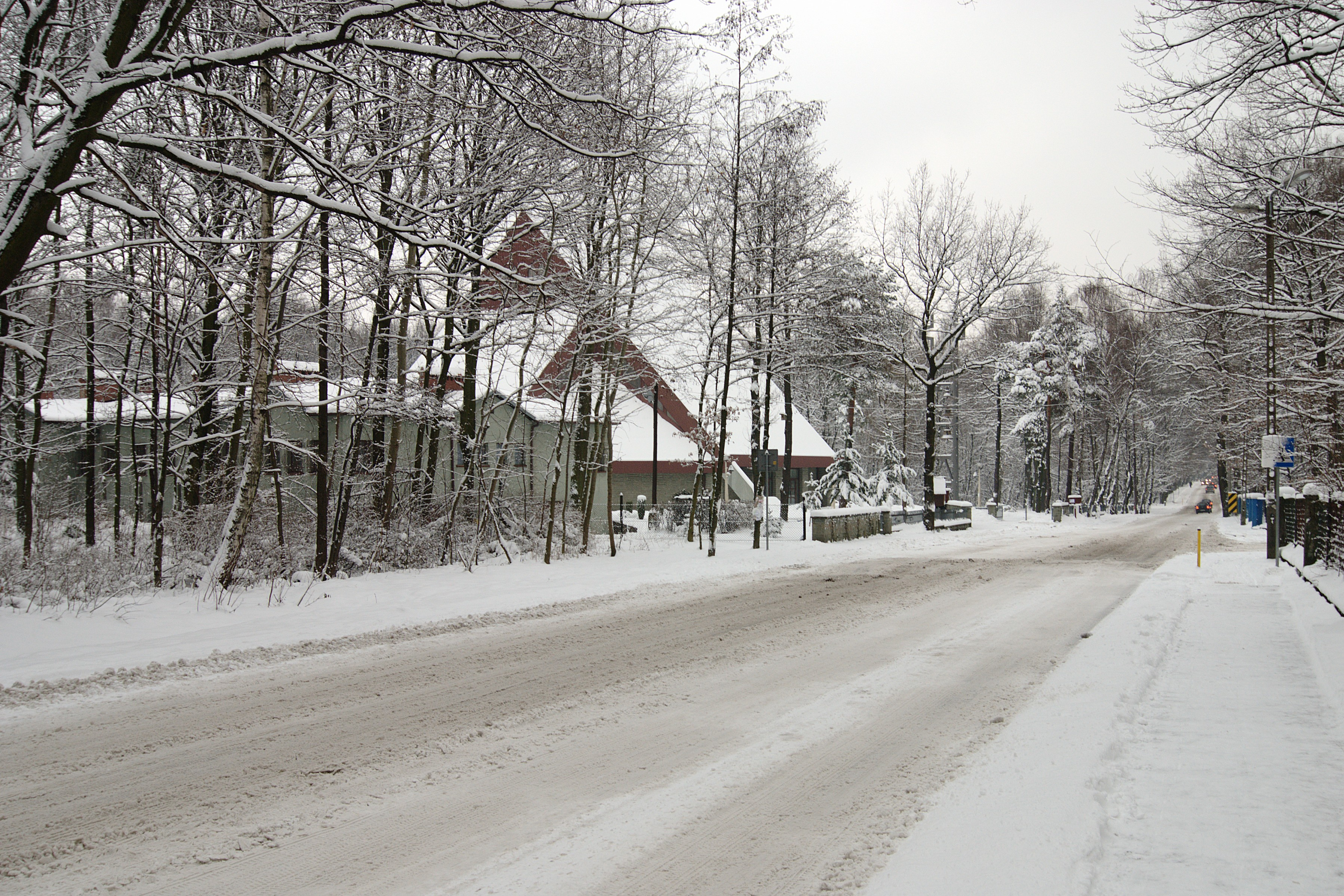 Zabrze. Ulica Jaskółcza.